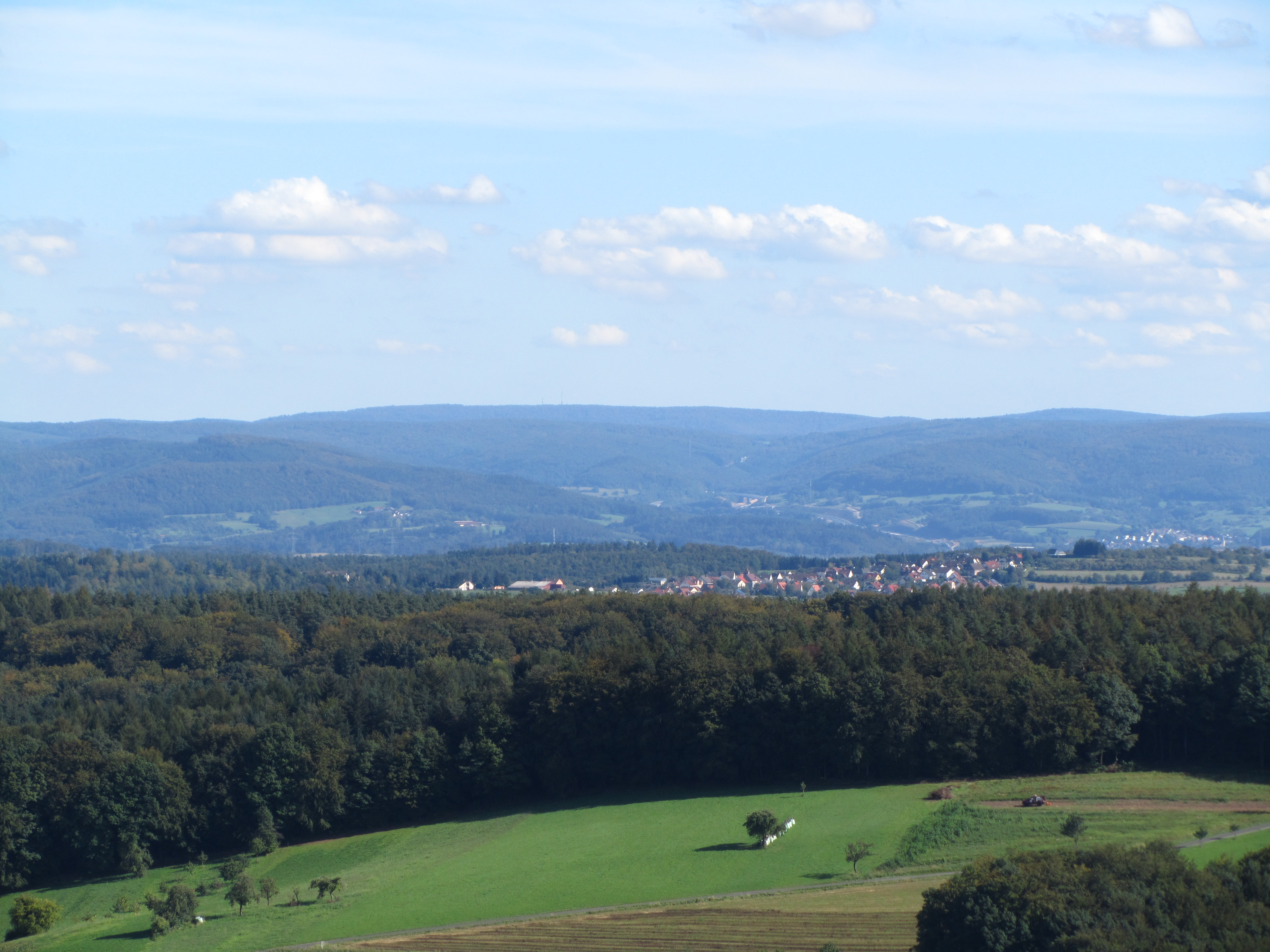 Geiersberg (568 m), höchster Spessartgipfel, von Nordwesten aus 30 km Entfernung, gesehen vom Ludwigsturm auf dem Hahnenkamm